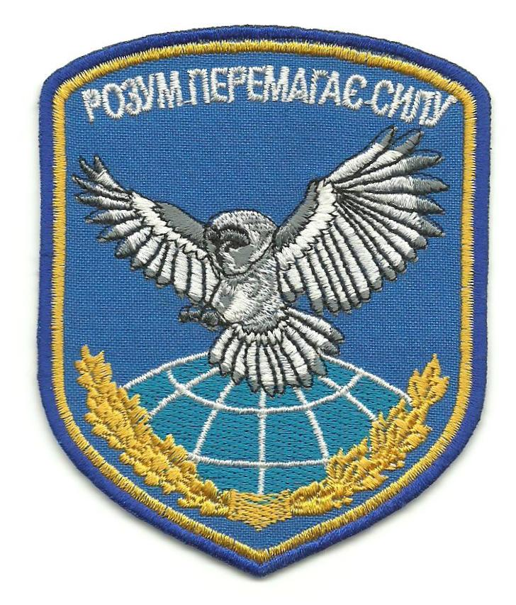 Нарукавний знак 72-го центру інформаційно-психологічних операцій